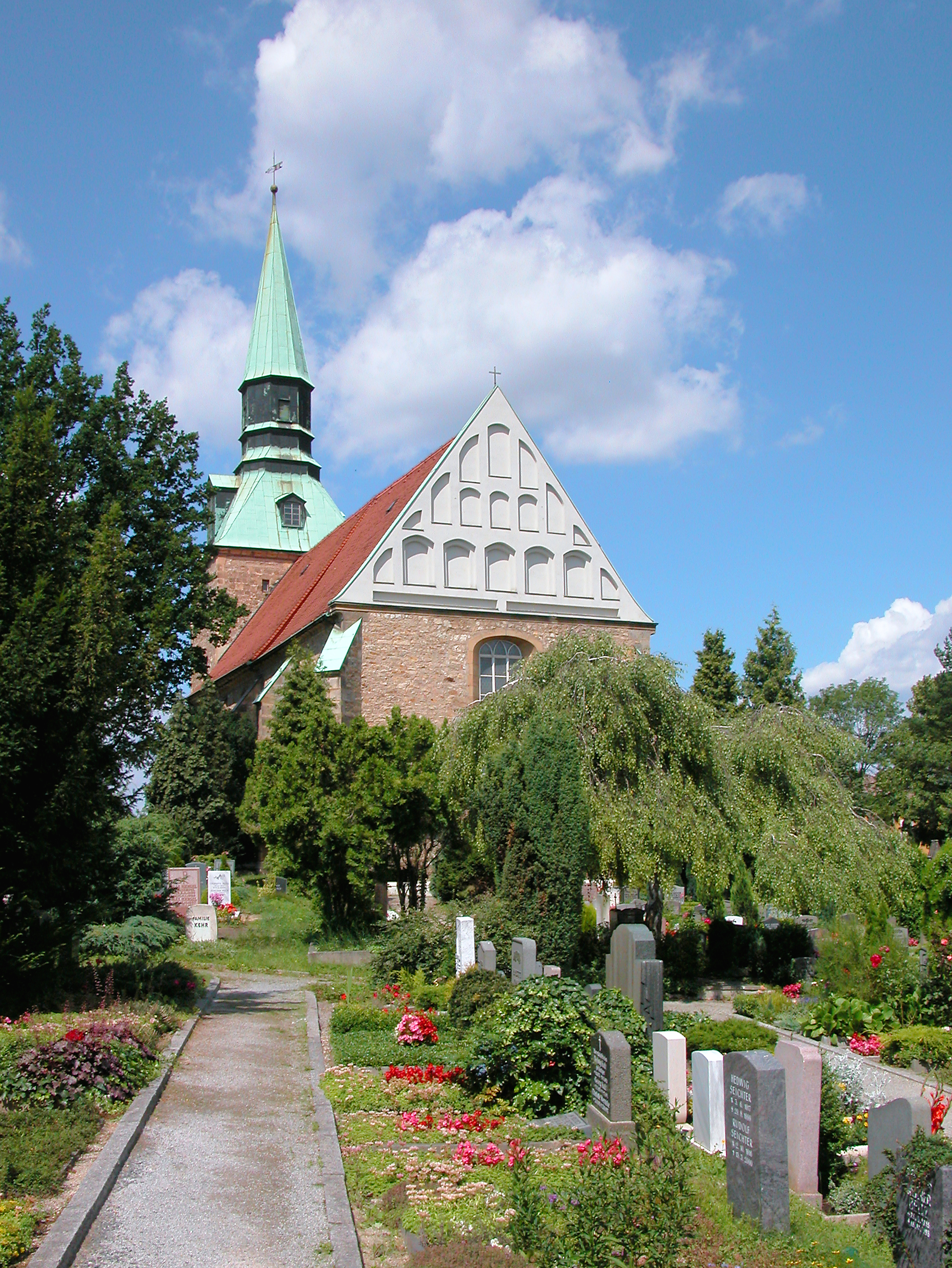 08.07.2007 01239 Dresden Leubnitz-Neuostra, Altleubnitz (GMP: 51.012825,13.767266): Dorfkirche: Einschiffiger spätgotischer Bau, Chor 1511, Langhaus um 1720. Sicht von Osten. [DSCN28391.TIF]20070708085DR.JPG(c)Blobelt